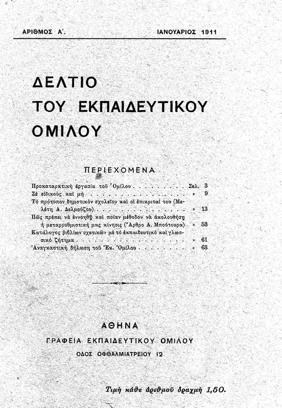 Δελτίο Εκπαιδευτικού Ομίλου Α΄ τεύχος, Ιανουάριος 1911